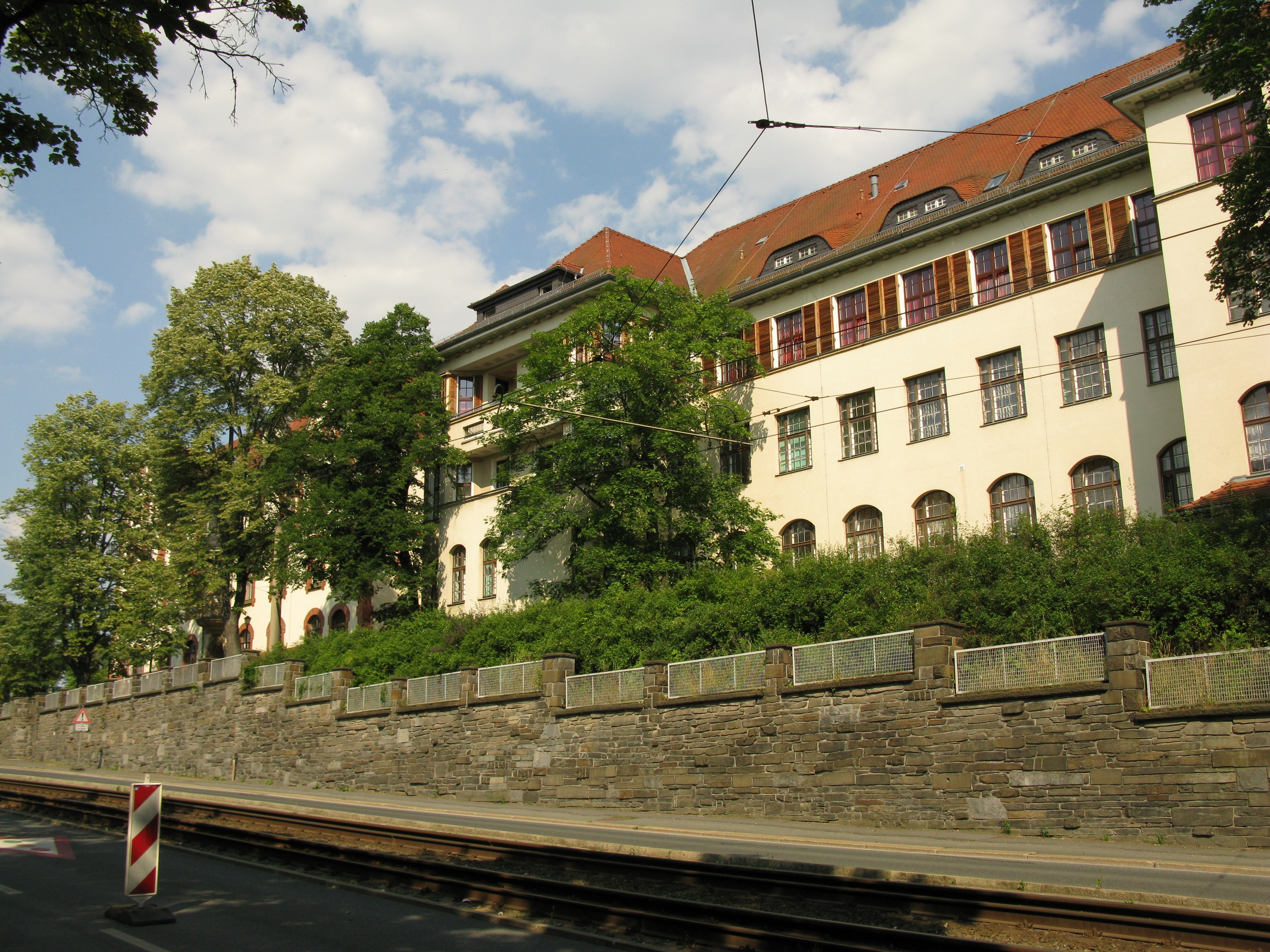 Plauen-Reusa, denkmalgeschütztes Haus in der Röntgenstraße (Röntgenstraße 2). Ein Gebäude auf dem Gelände des Vogtlandkilikums.